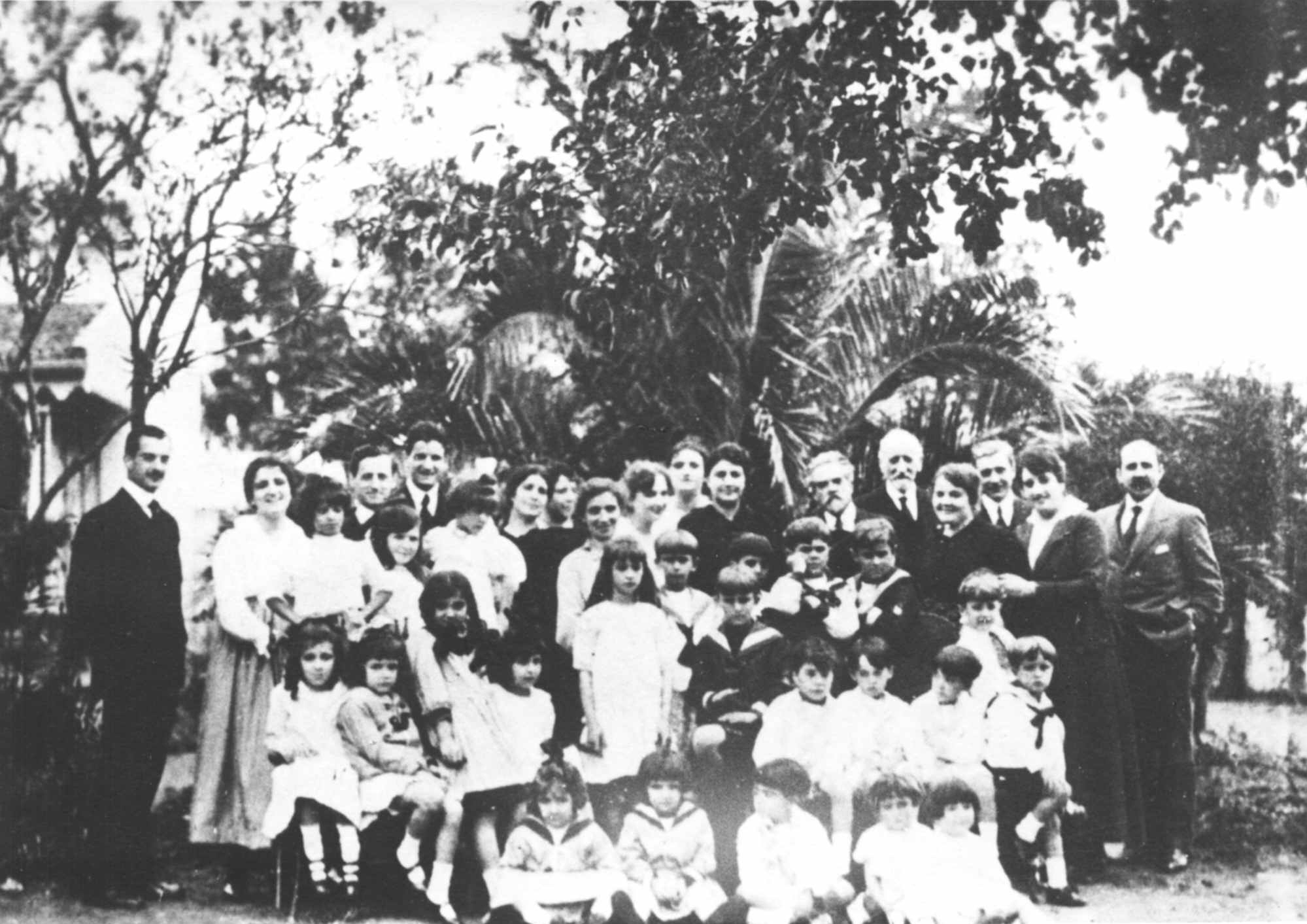 Fotografía del escritor, periodista, docente y diplomático uruguayo Juan Zorrilla de San Martín (1855 - 1931) junto a su familia.